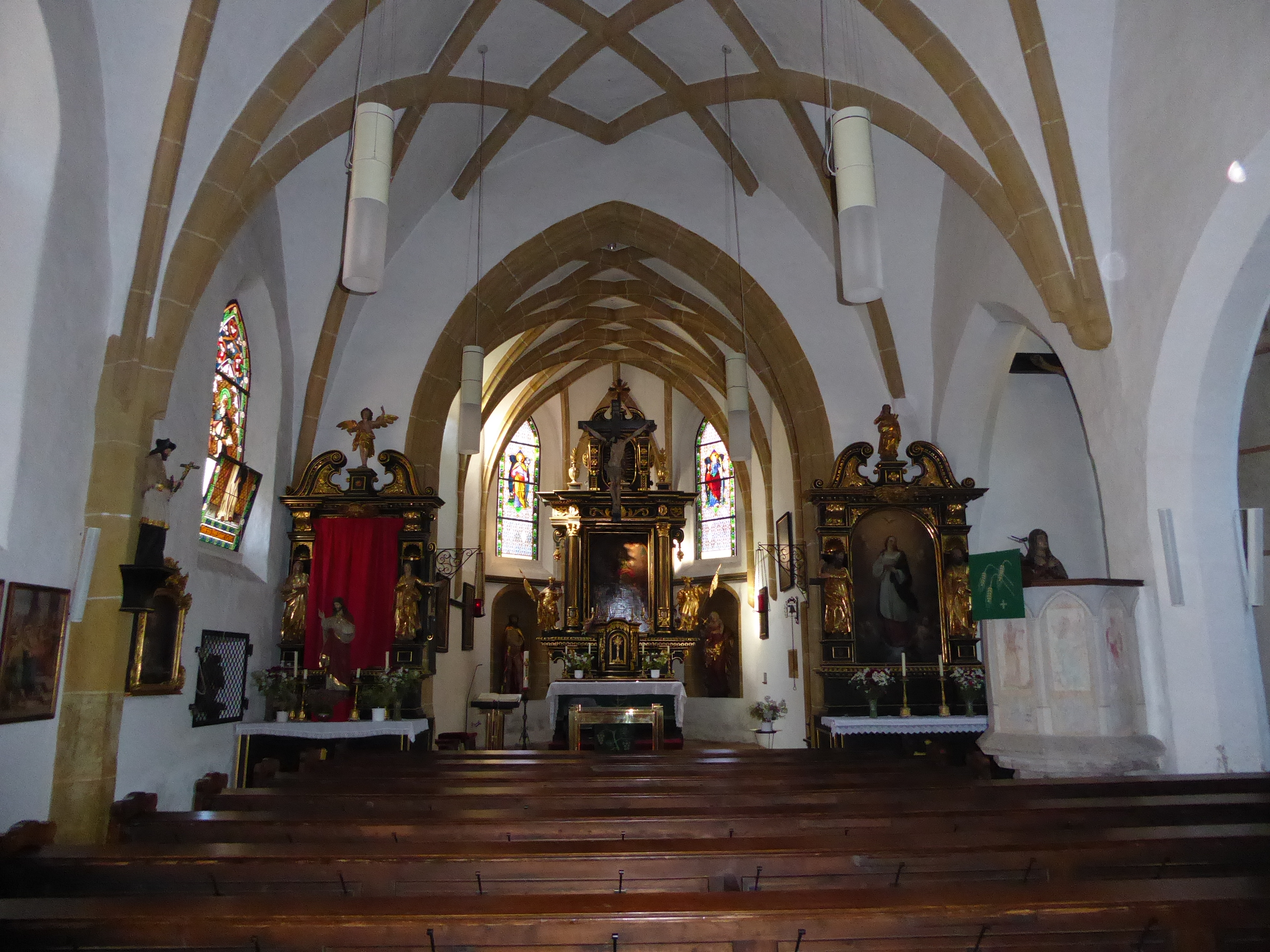 Bürgerspitalkirche hl. Katharina, Eberhard-Platz, Waidhofen an der Ybbs, Niederösterreich